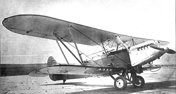 Р-5.